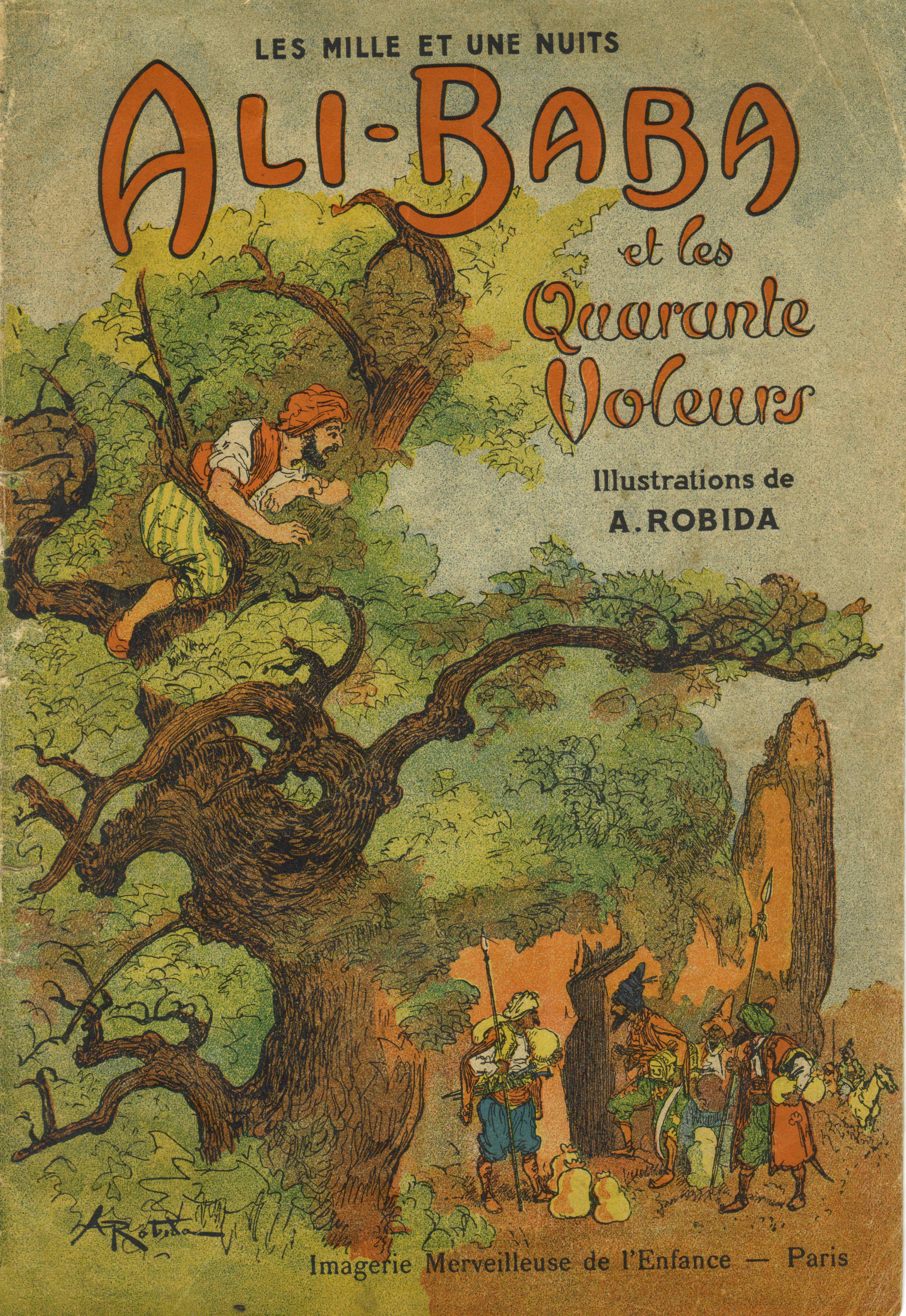 Aliba-Baba et les quarante voleurs Illustration d'Albert Robida - Paris - Imagerie Merveilleuse de l'Enfance